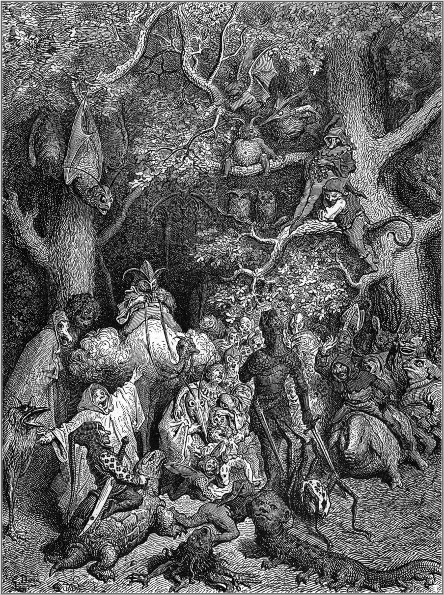 illustration of Ludovico Ariosto’s “Orlando Furioso”.